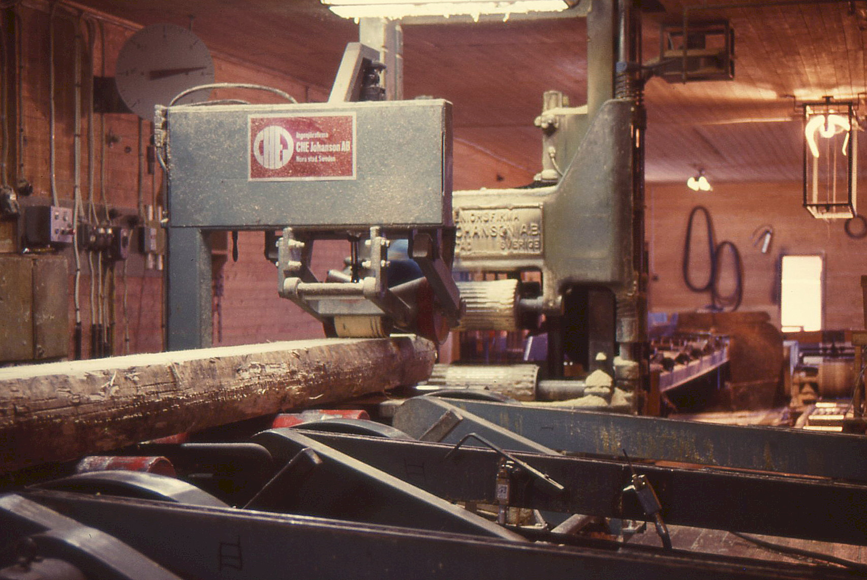 Grangärde ångsåg i juli 1984